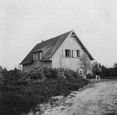 Naturfreundehaus von Heinrich Julius Frey in Wollingst